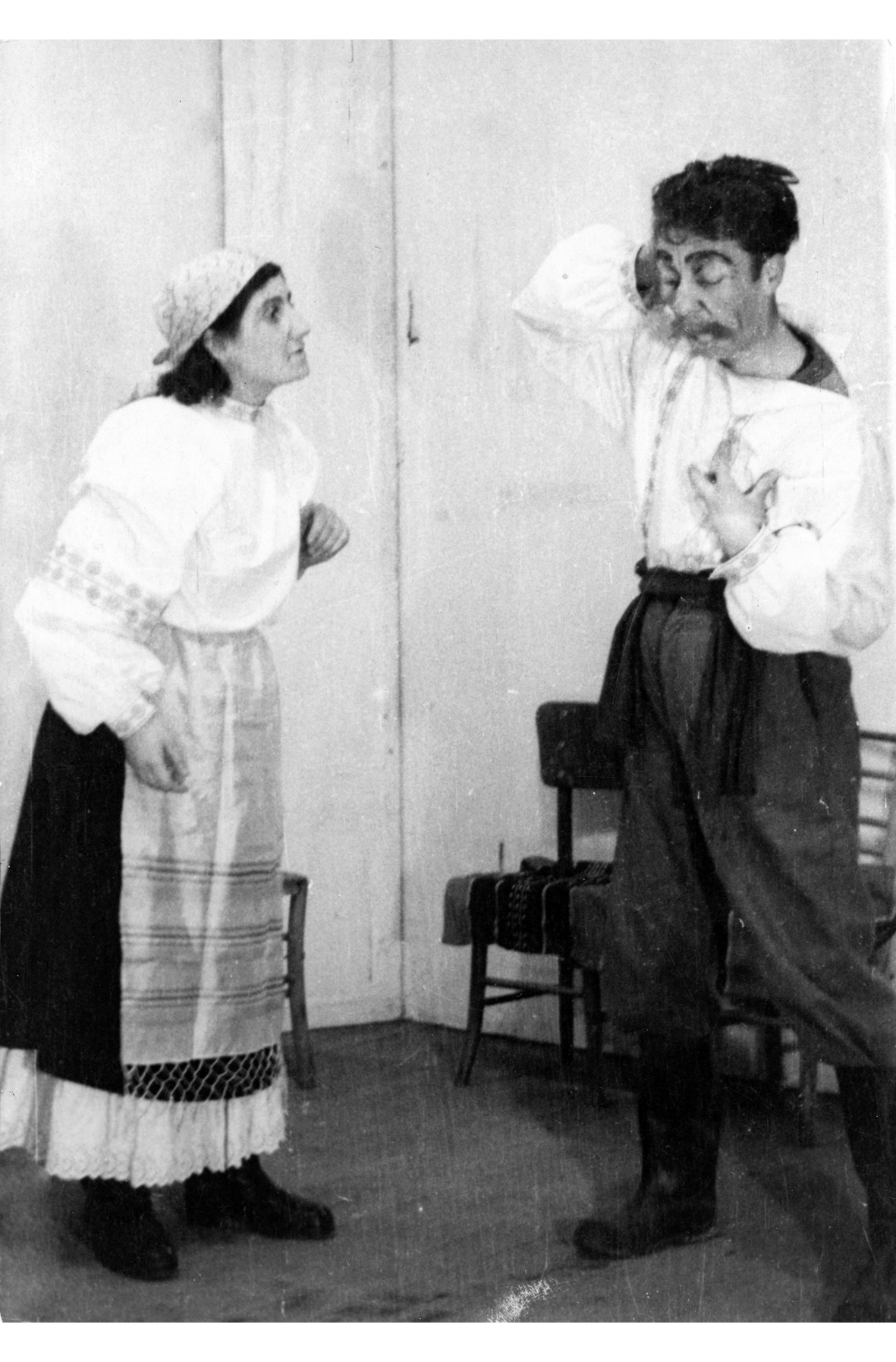 Янко Ганев на театралната сцена